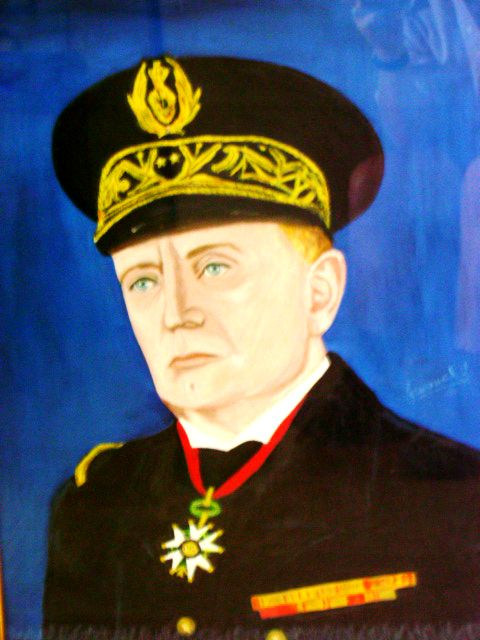 Contre amiral Pierre Goybet (1887-1963), Commandeur de la Légion d'honneur. Principaux faits: -De septembre 1914 à janvier 1917, il sert au front d'abord comme second puis comme commandant de pièces de Marine, dans la forêt de Champenoux, au bois des railleuses à Barthélémont, à Thionville, à Mourmelon-le-Petit, à Hagenbach, enfin à Verdun à la pièce du Bois Bourrut. -Le 20 juillet 1933, il est nommé commandant de la Ville d'Ys, un aviso qui effectue des missions d'assistance au profit de la flottille de pêche au large de Terre-Neuve, du Labrador et du Groenland et à ce titre à de fréquents contacts avec les Canadiens et Américains.Il débarque à Aruba aux Antilles en mai 1940 avec le corps de débarquement du croiseur Primauguet pour défendre les dépôts pétroliers de la Shell et de la Standard Oil. -Entre le 17 mai et le 23 juin 1940 , plusieurs cuirassé et croiseurs, dont le Primauguet commandé par le capitaine de vaisseau Goybet ont soustrait l'or de la Banque de France ainsi que l'or et les bijoux de la Couronne belge aux mains des Allemands, 2800 Tonnes de métal ont été conduits dans des pays considérés comme surs (États-Unis, Canada, Antilles, Afrique du Nord et Afrique Noire) -Le 11 novembre 1942, alors commandant du port de Casablanca, il négocie la reddition avec les Américains qui viennent de débarquer en Afrique du Nord et reçoit chez lui les généraux George Patton, Kees et wilburg après trois jours de combat